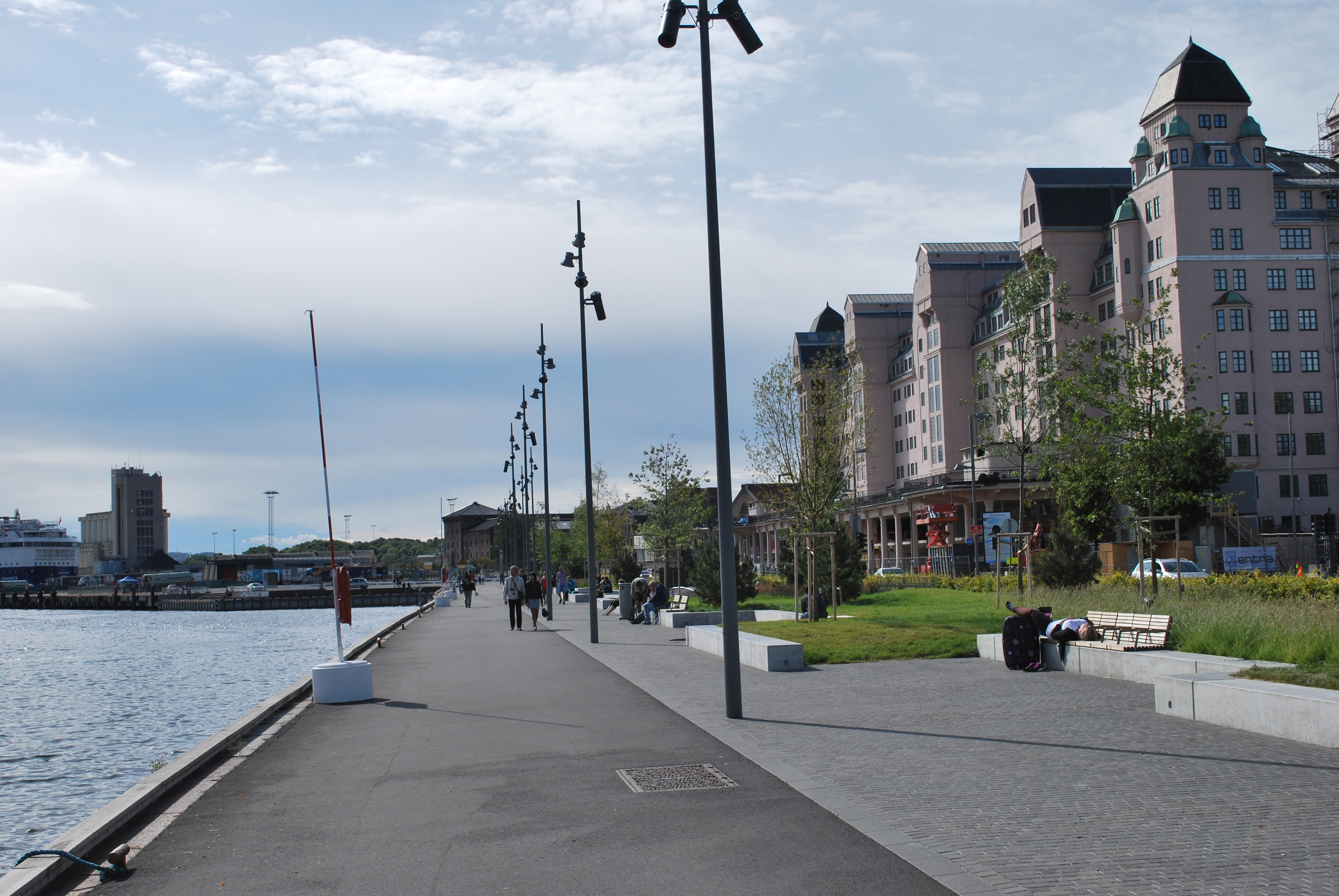 En tidlig parsell av den planlagte Havnepromenaden langs Langkaia, Oslo, fullført 2013